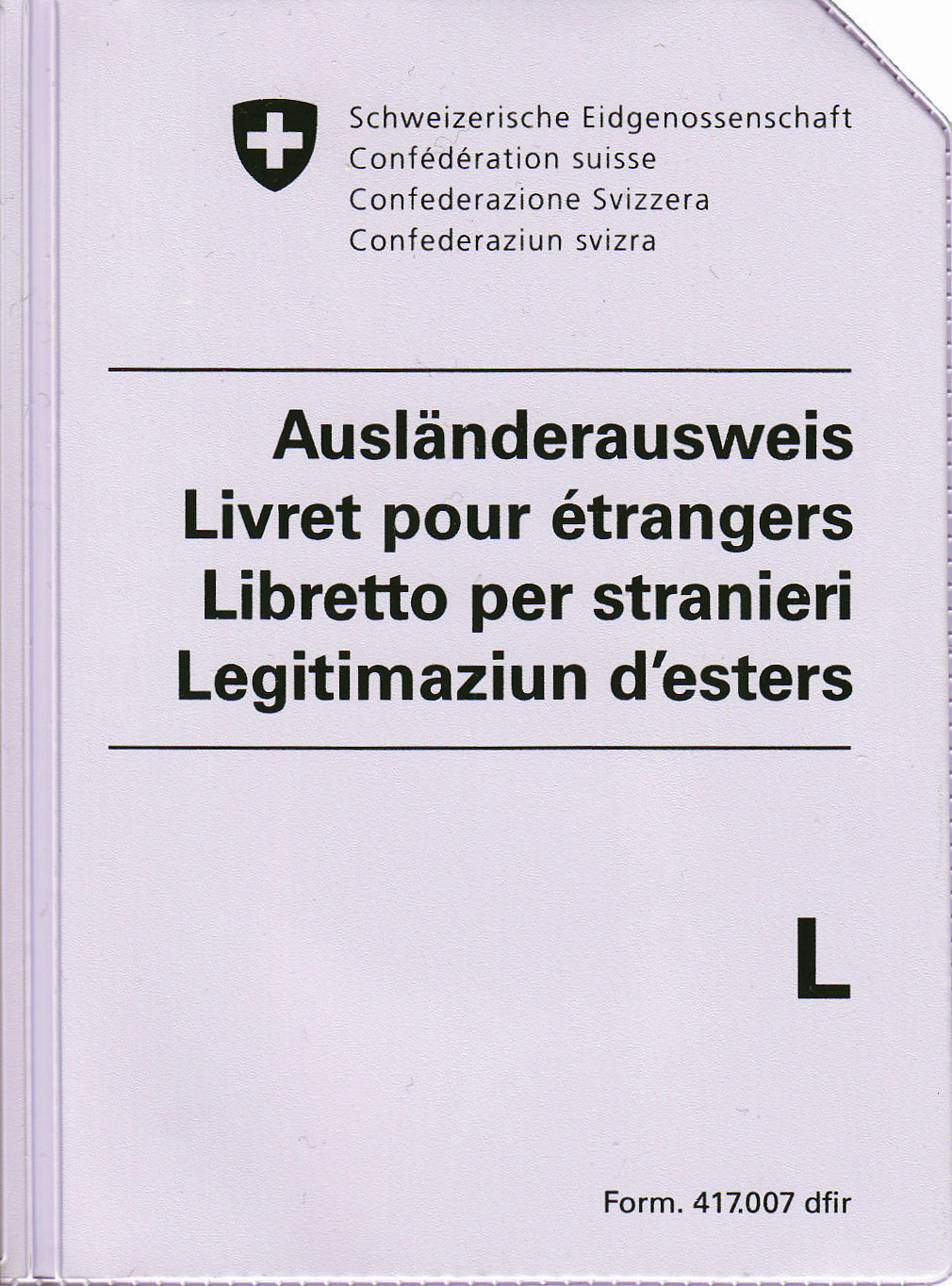 Ausländerausweis L (fliederfarben) (Schweiz)